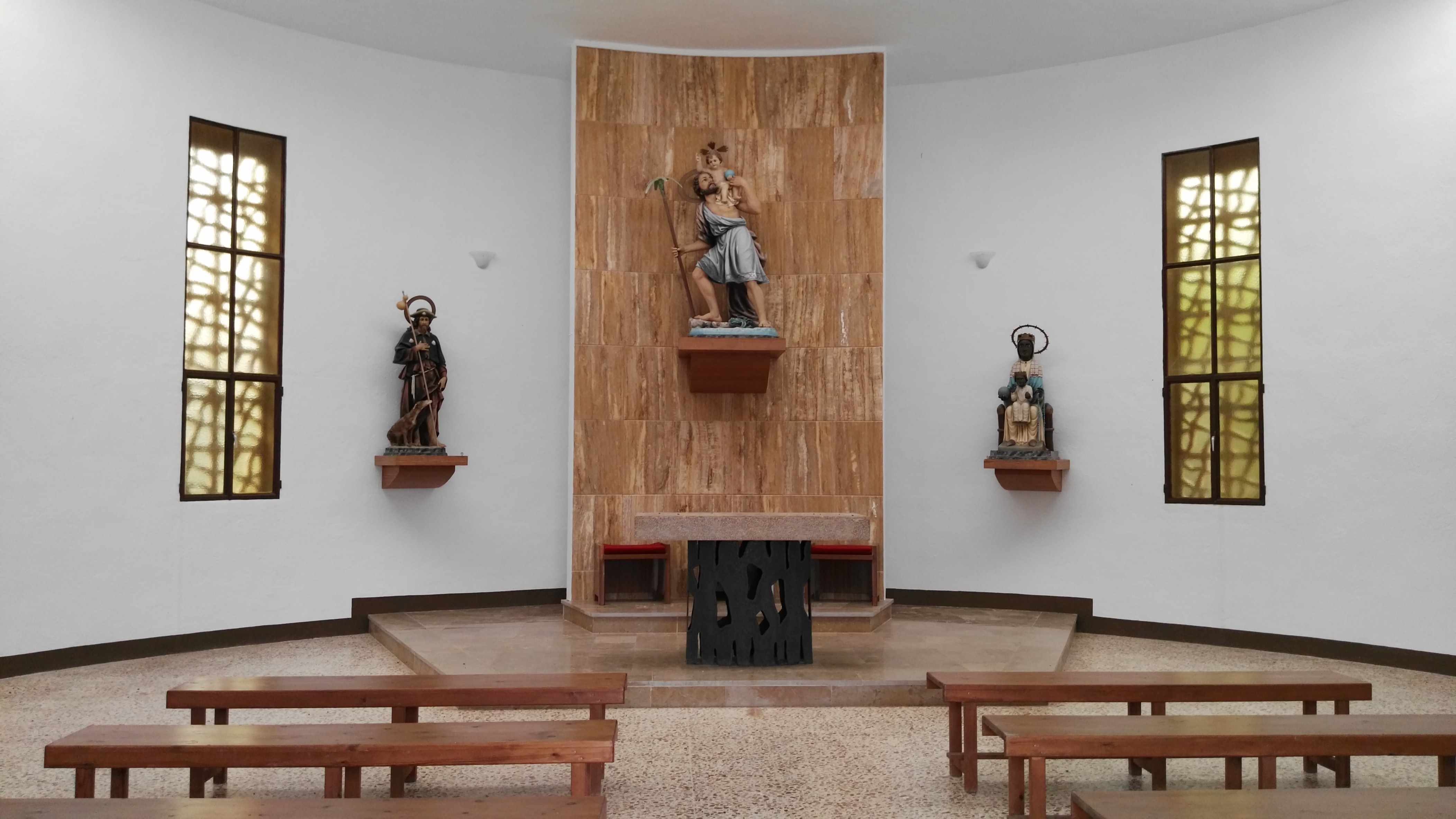 Interior de l'ermita de Sant Cristòfol. El Perelló